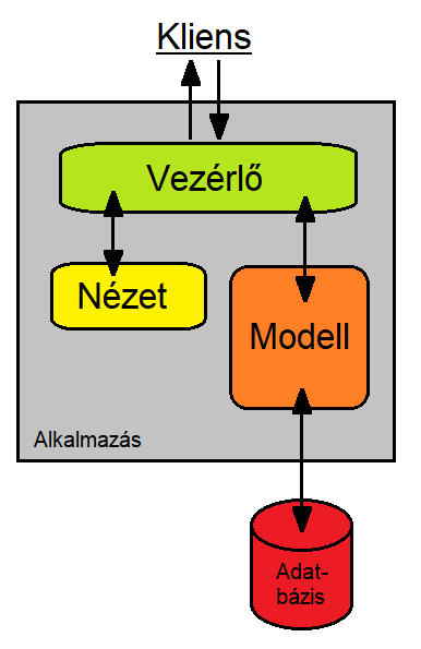 MNV-reprezentáció